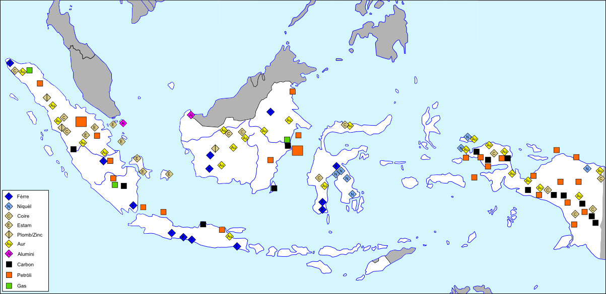 Ressoursas naturalas principalas d'Indonesia.